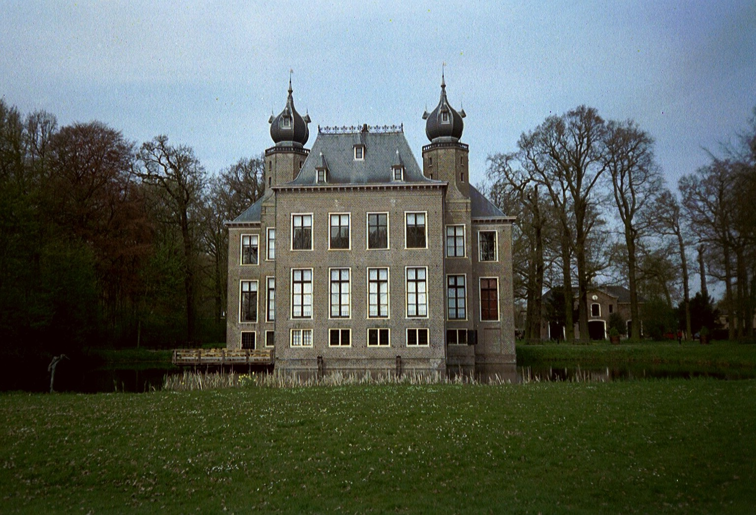 Oud Poelgeest, Laan van Oud Poelgeest, Oegstgeest. Foto genomen op 17 april 2004 en geupload door maker.